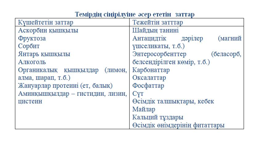 Темірдің сіңірілуіне әсер ететін заттар